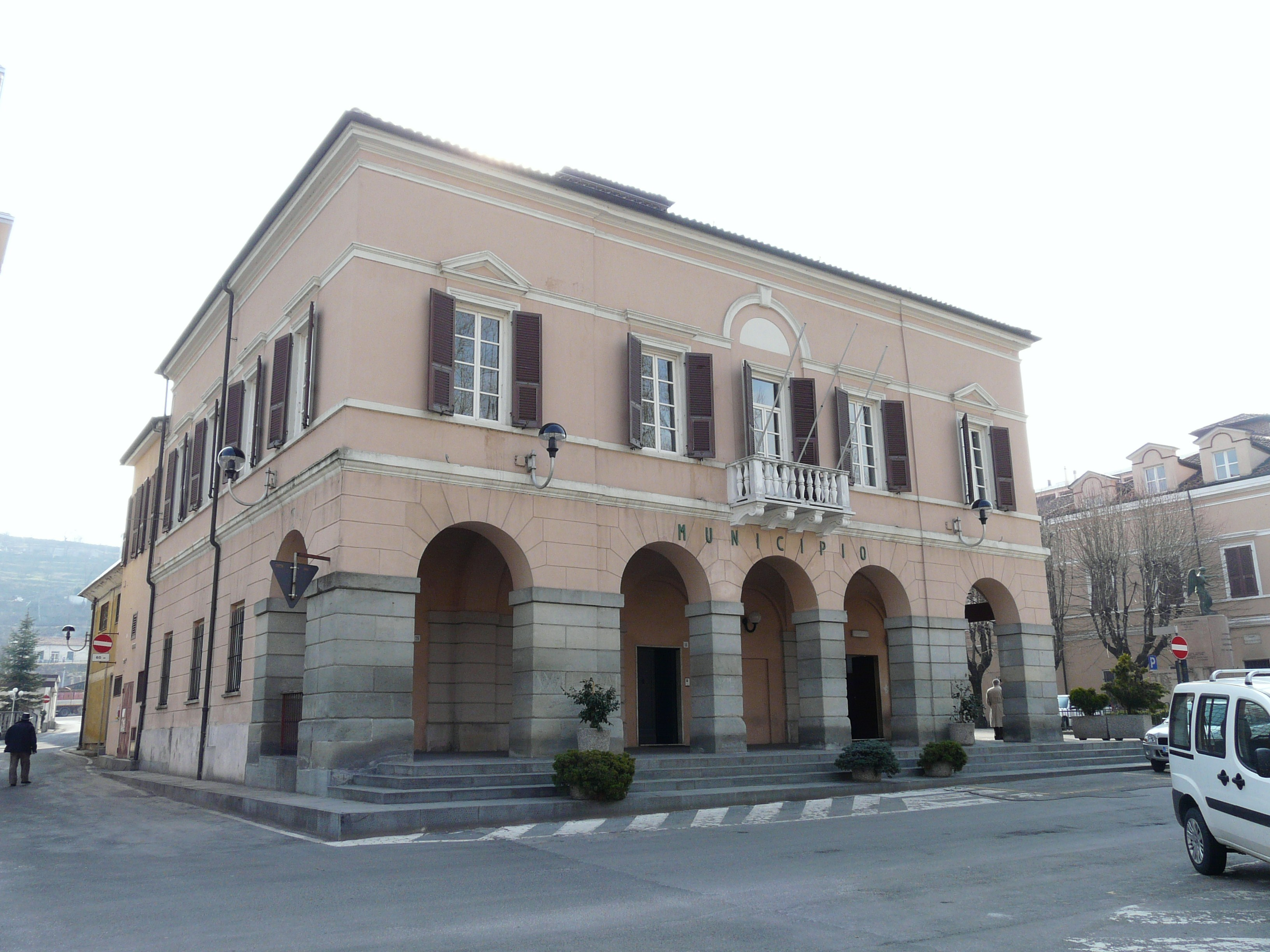 Municpio, Carcare, Liguria, Italia